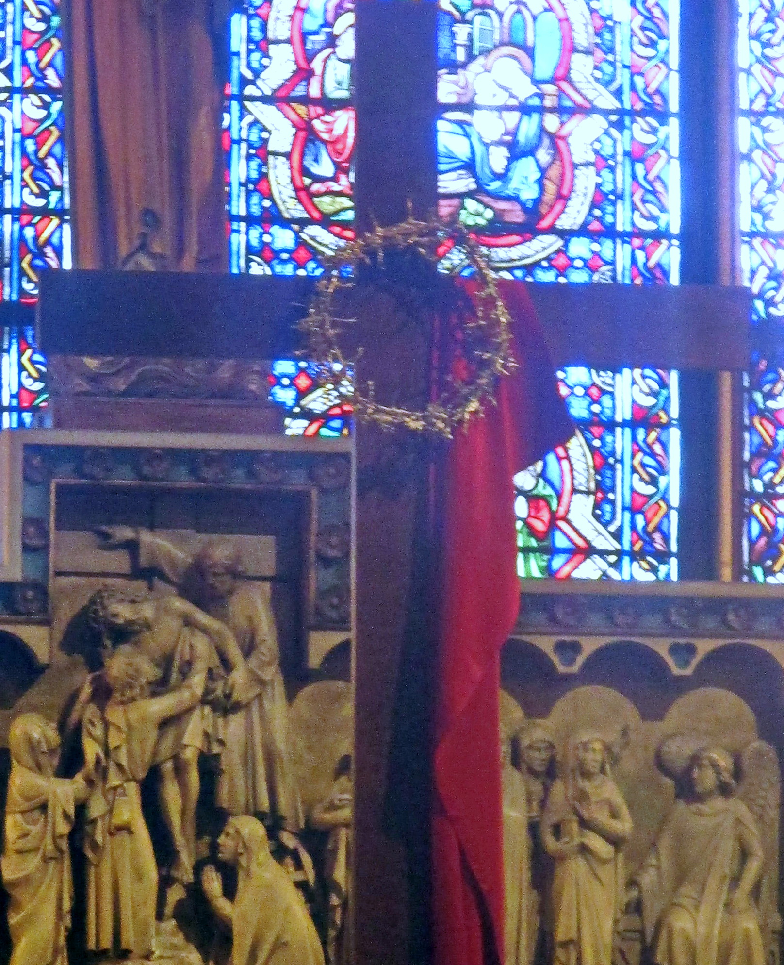 La Sainte Couronne d'épines à Notre-Dame de Paris.